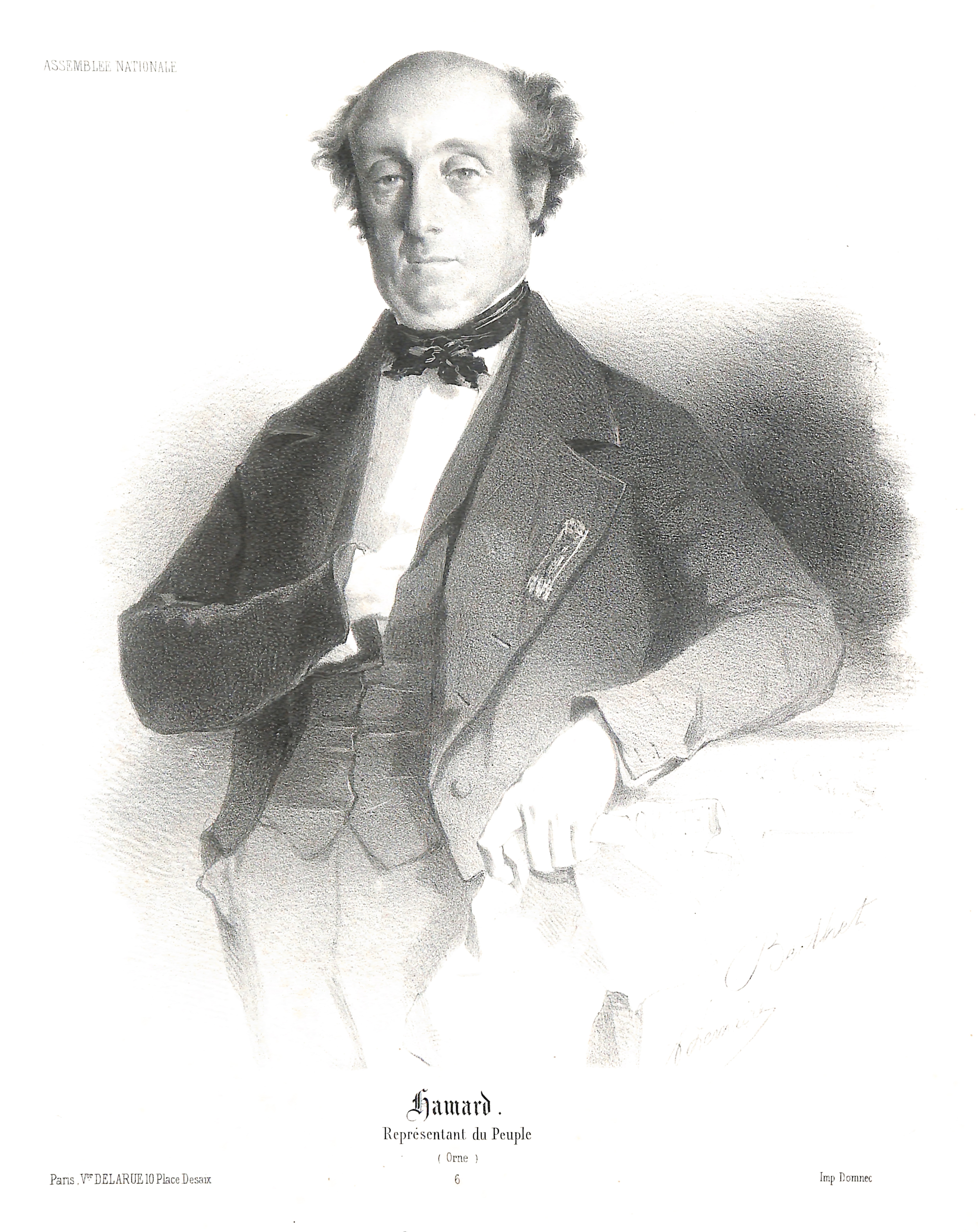 Portrait de Pascal HAMARD - député de l'Orne et maire de Domfront